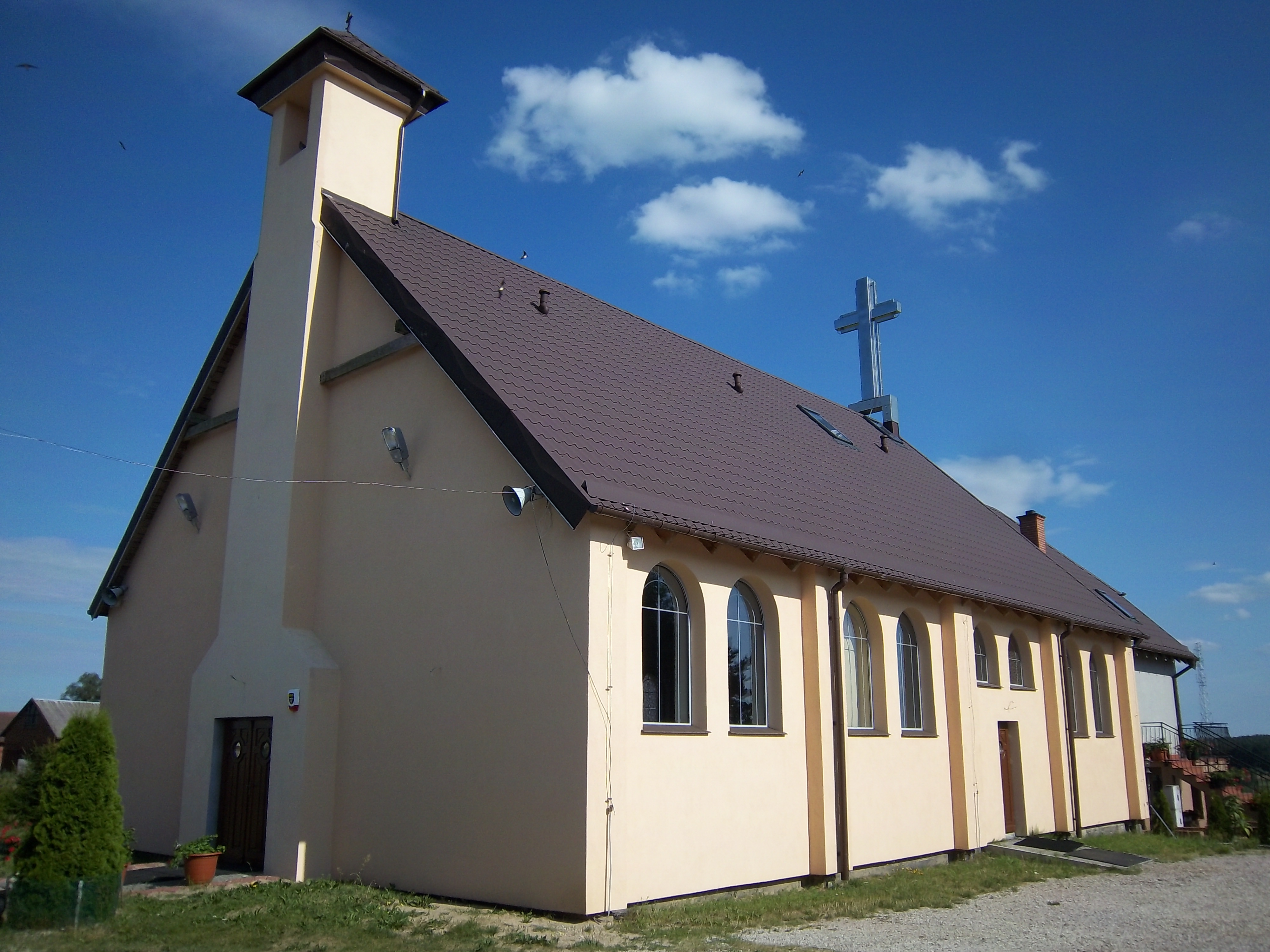 Wójtowo - rzymskokatolicki kościół parafialny p.w. NMP Królowej Męczenników